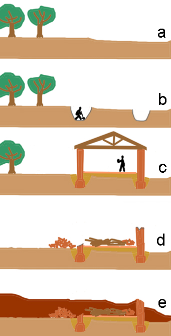 mio disegno L'immagine mostra schematicamente eventi e azioni che portano alla formazione di unità stratigrafiche (tracce sul terreno) positive (di accumulo di materiale) o negative (sottrazione di materiale).